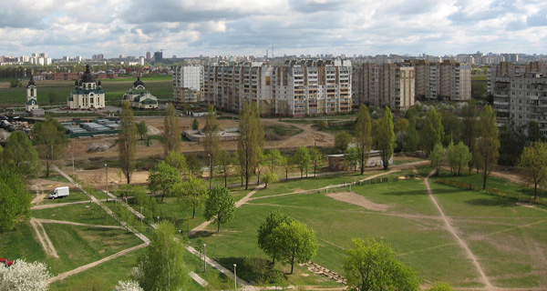 no original description